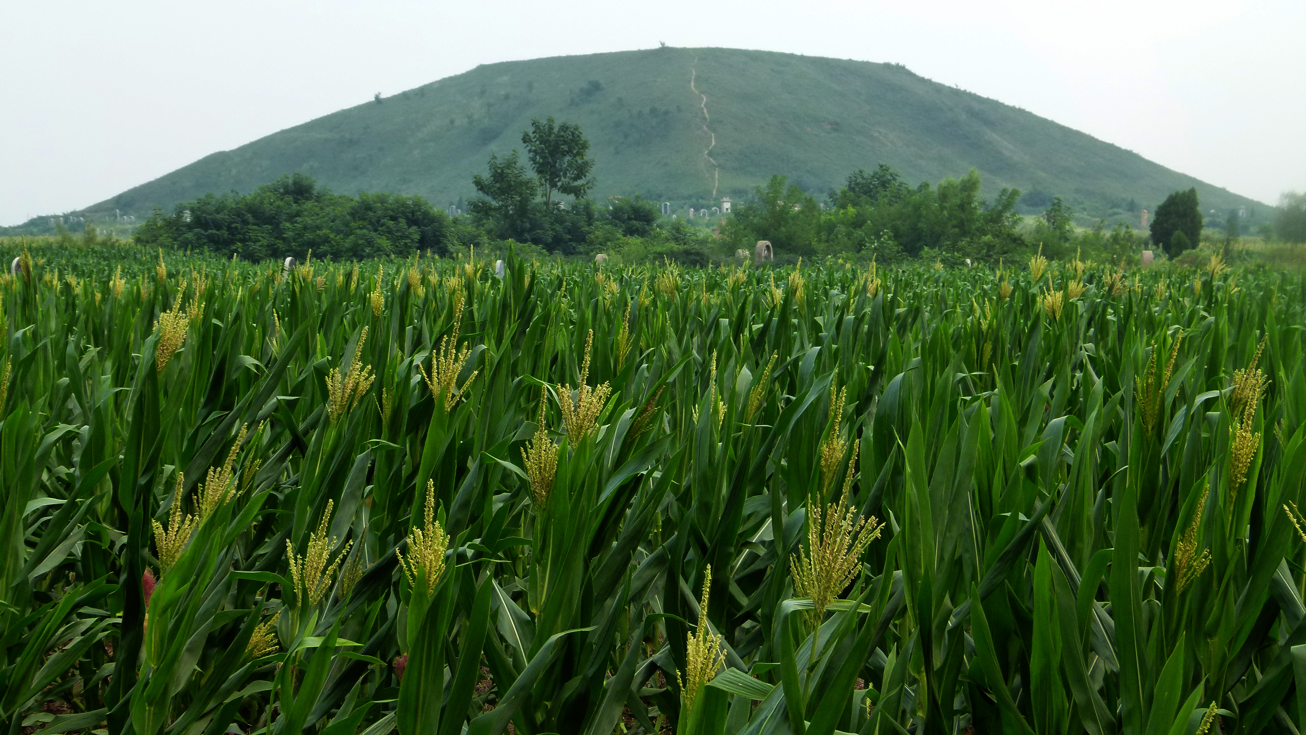 Yanling - Grab des Kaisers